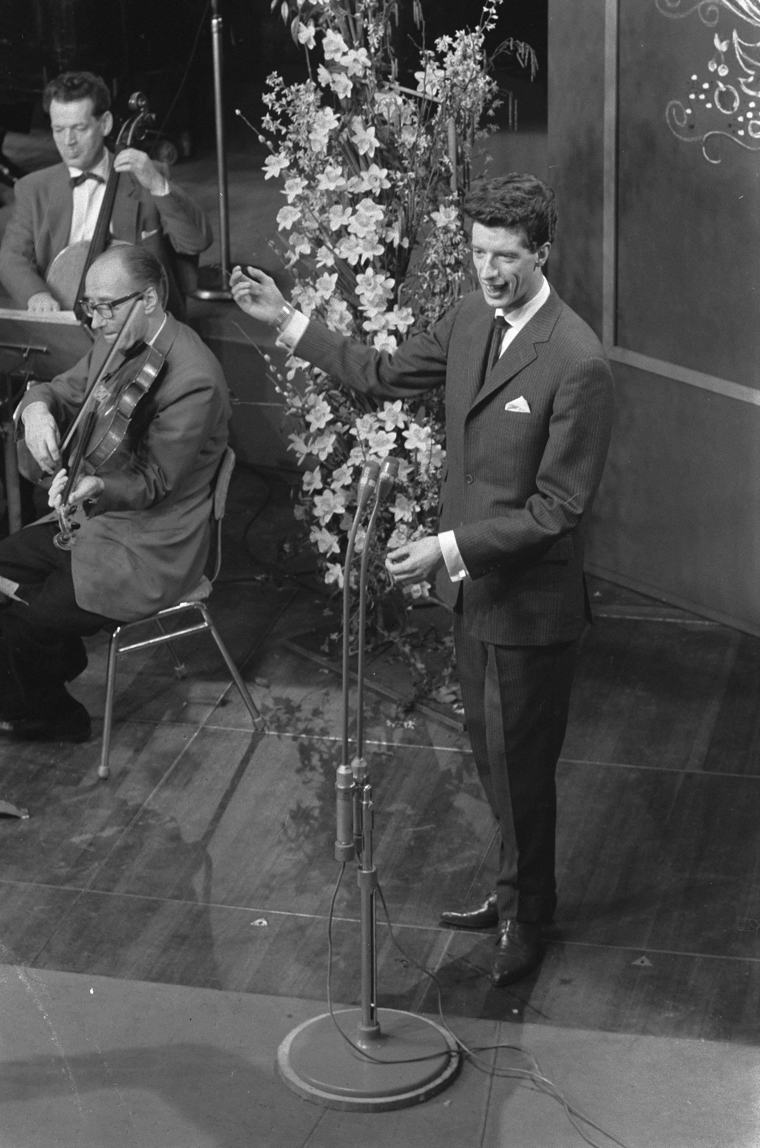 Collectie / Archief : Fotocollectie Anefo Reportage / Serie : [ onbekend ] Beschrijving : Finale van het Nationaal Songfestival 1960 in Hilversum, Rudy Carrell Datum : 9 februari 1960 Locatie : Hilversum Trefwoorden : artiesten, muziek, songfestivals Persoonsnaam : Carrell Rudy Fotograaf : Pot, Harry / Anefo Auteursrechthebbende : Nationaal Archief Materiaalsoort : Negatief (zwart/wit) Nummer archiefinventaris : bekijk toegang 2.24.01.05 Bestanddeelnummer : 911-0172